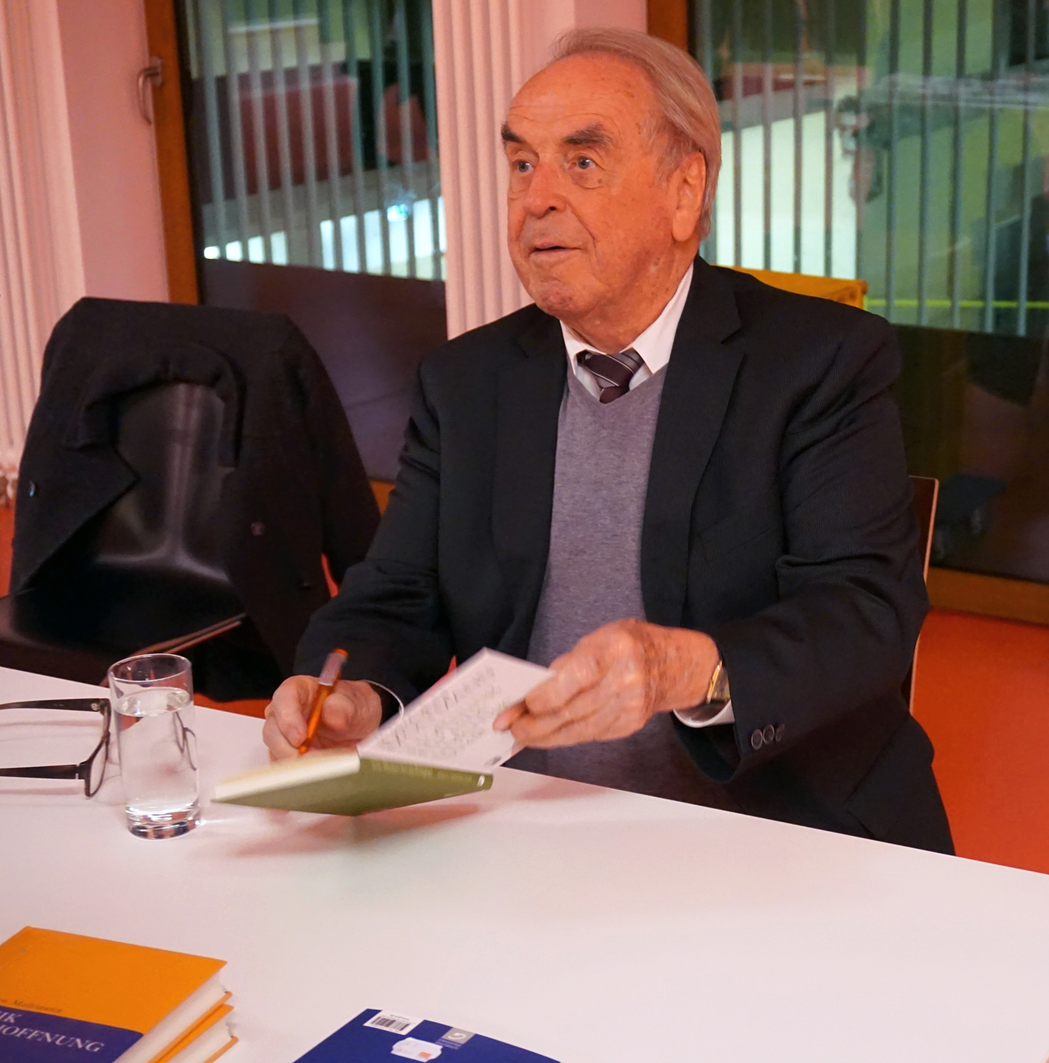 Jürgen Moltmann im Hospitalhof Stuttgart. März 2016